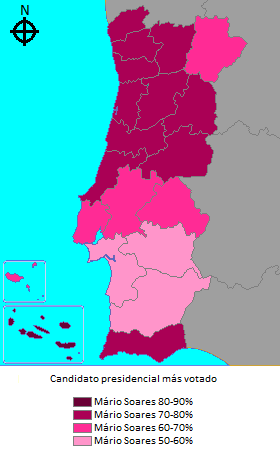 Resultados das eleições presidenciais de 1991